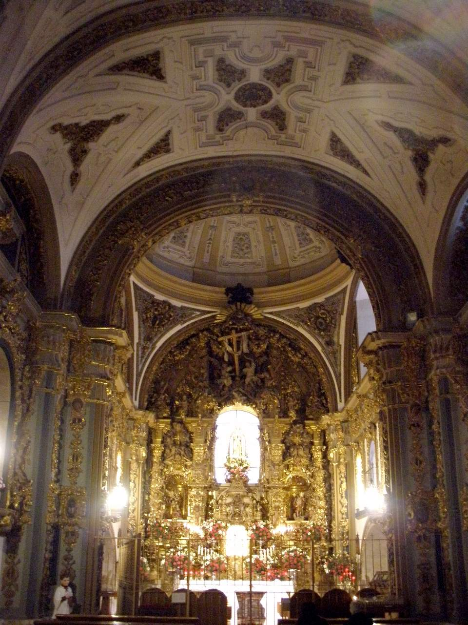 Iglesia de la Vera Cruz (Salamanca)